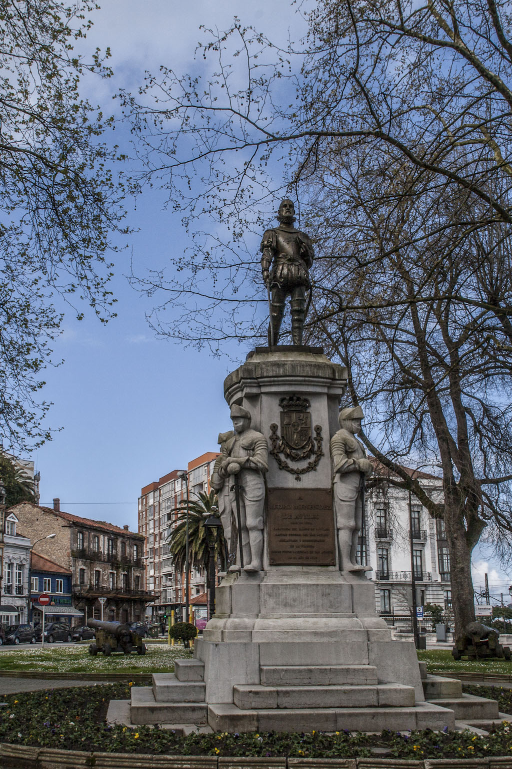 Obra de Manuel Garci-González. Parque del Muelle, Avilés